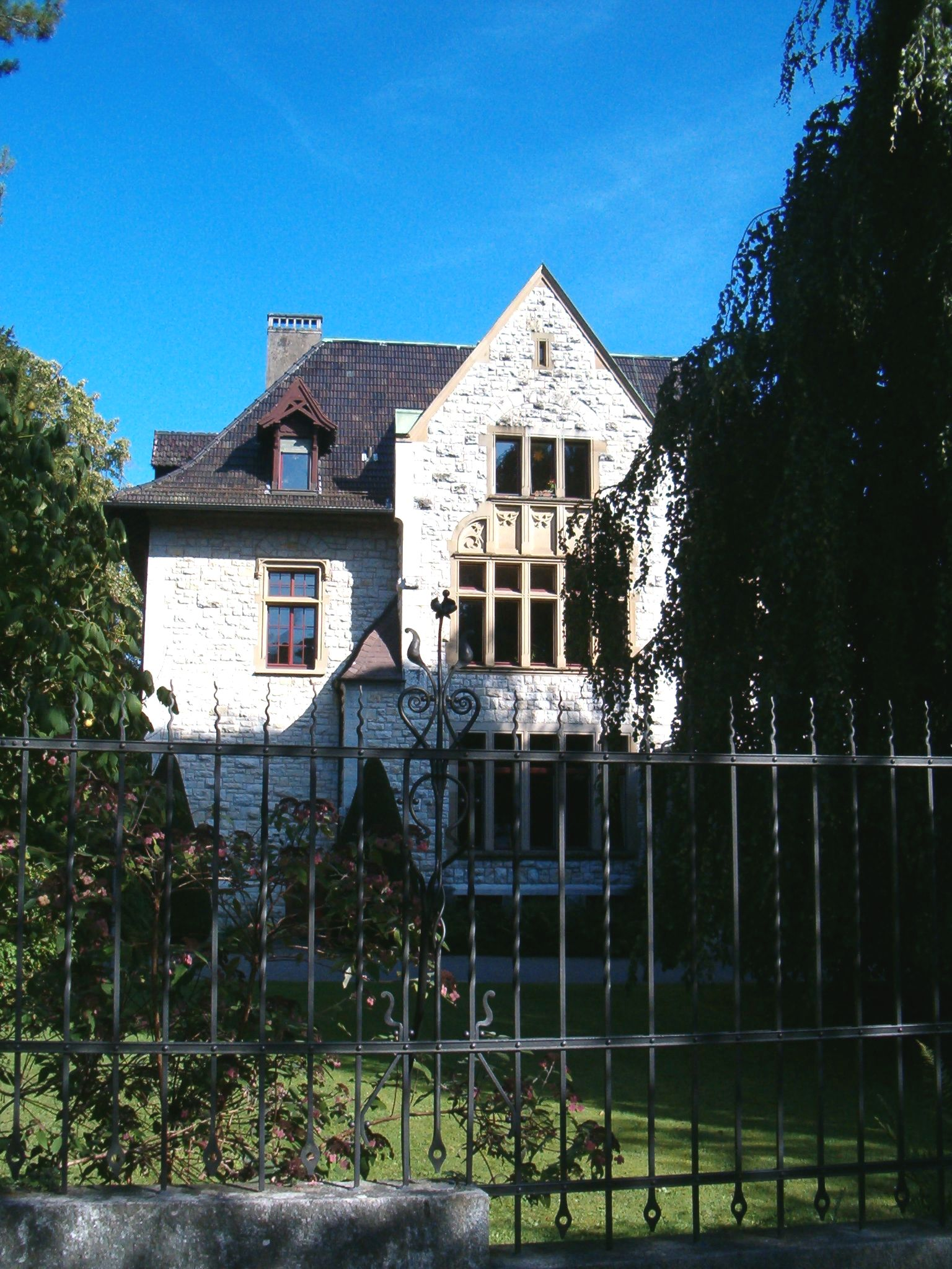 Villa Boveri, Blick von der Strasse.